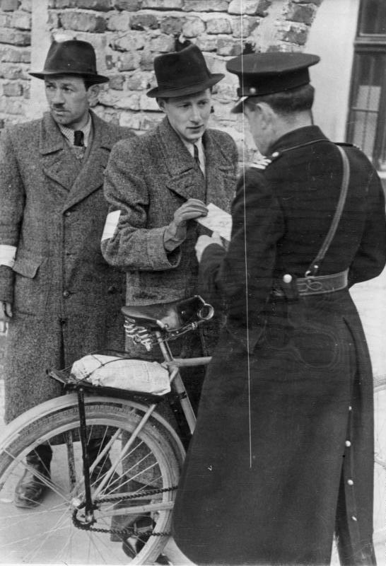 Polen, Ghetto Krakau, Ausweiskontrolle ADN-ZB II. Weltkrieg 1939-1945 Judenverfolgung durch die faschistischen deutschen Besatzungstruppen in Polen. Im Ghetto einer Stadt im Generalgouvernement; polnische Polizisten kontrollieren die Ausweise der jüdischen Einwohner an den Zugängen.